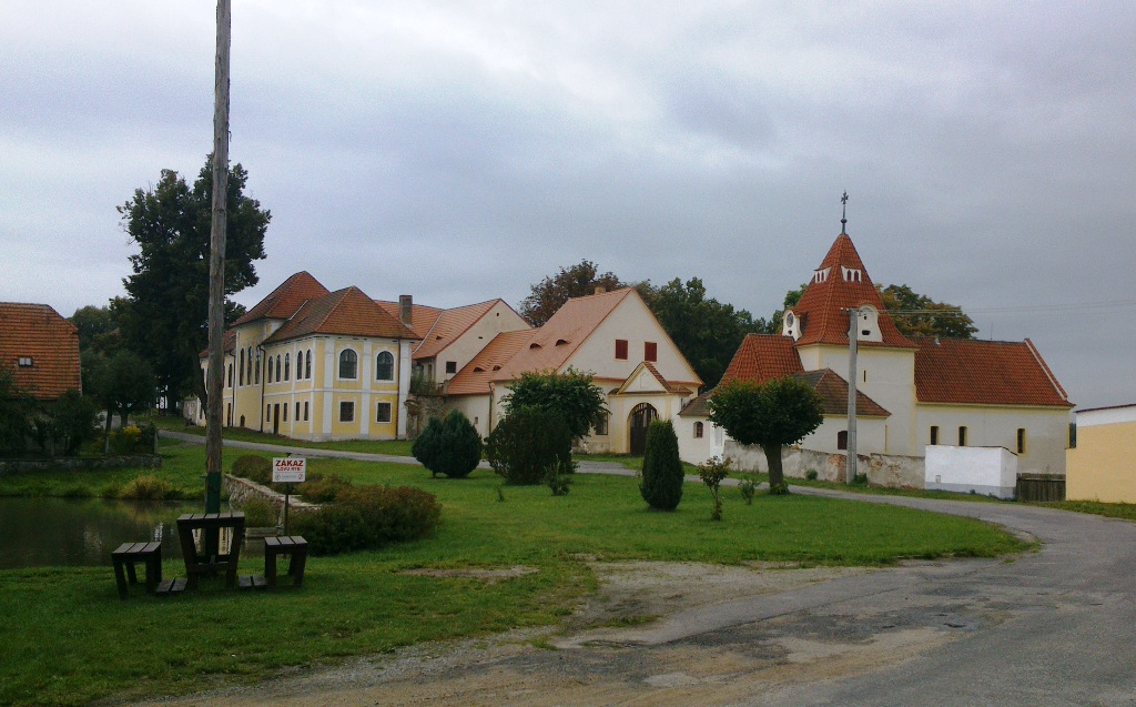 Zámek, s omezením: bez budovy býv. hostince na st. parc. č. 2 Varvažov, náves 1, Varvažov